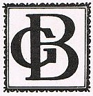 2-seitige historische Original Reklame von 1921